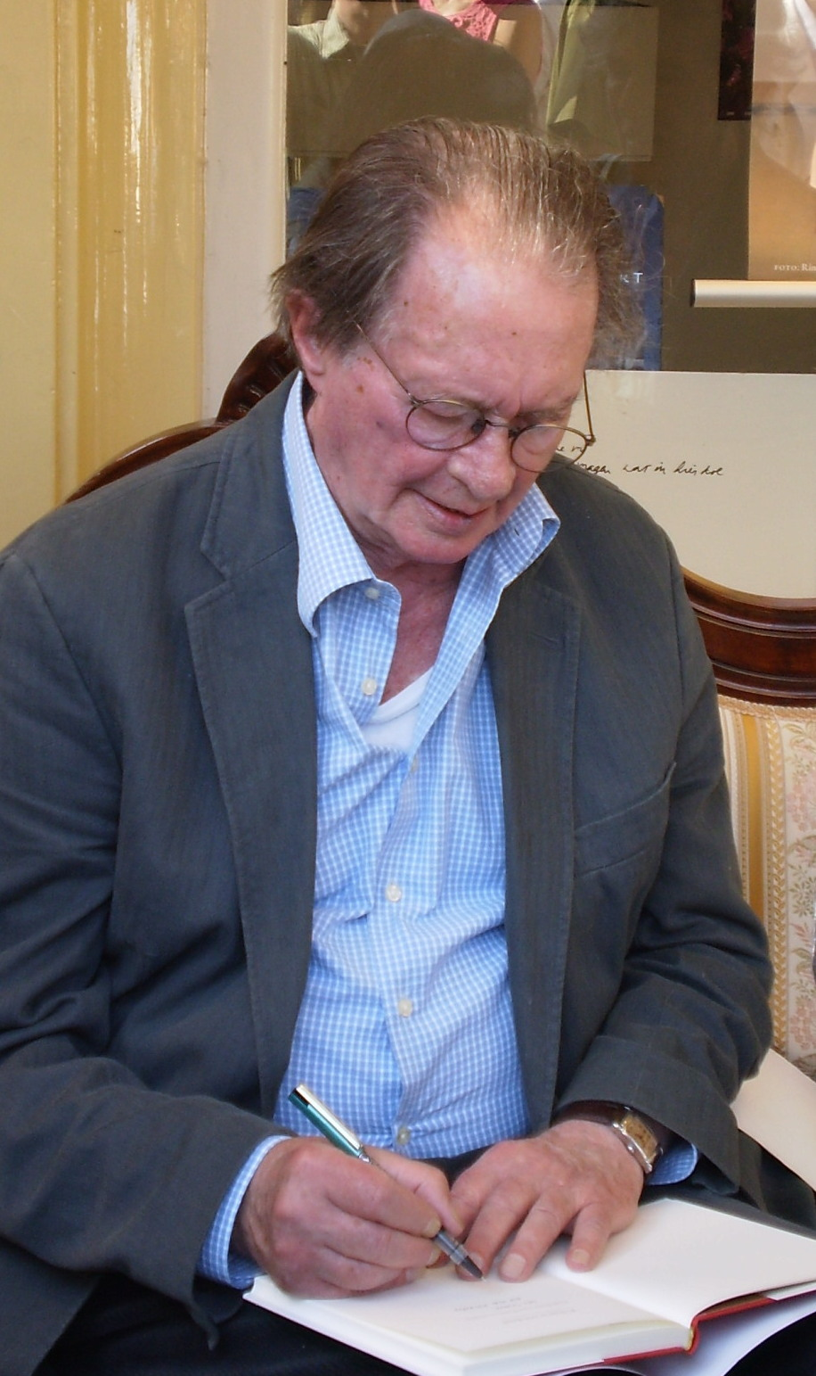 Remco Campert signeert op een gedichtenmiddag bij zijn 80e verjaardag. Athenaeum Boekhandel, Spui, Amsterdam